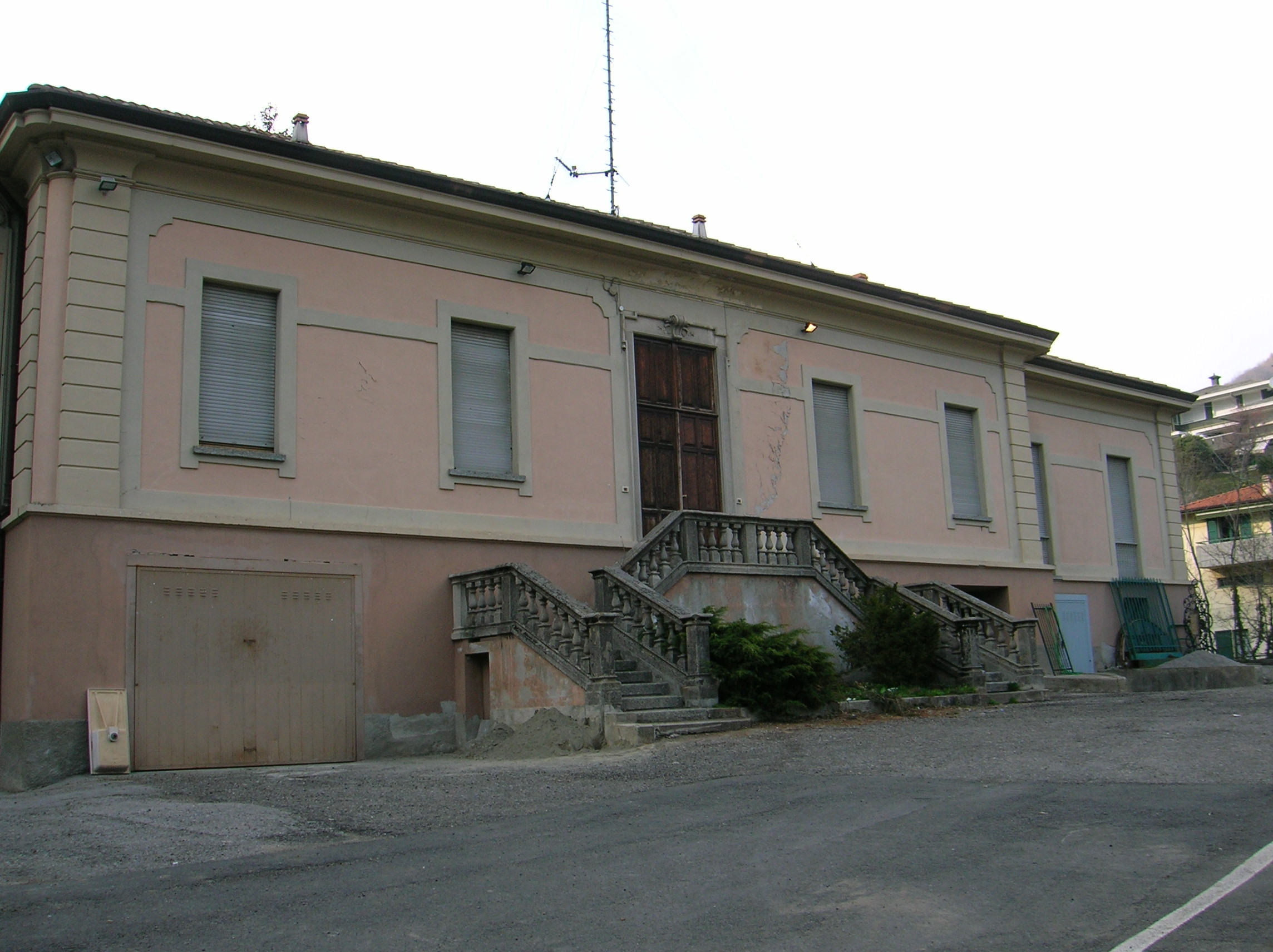 edificio vicino al ponte Oscuro di Asso (CO), una volta adibito a scuola media inferiore, poi a sede della Croce Rossa, e ad abitazione. Ora è sede degli alpini.